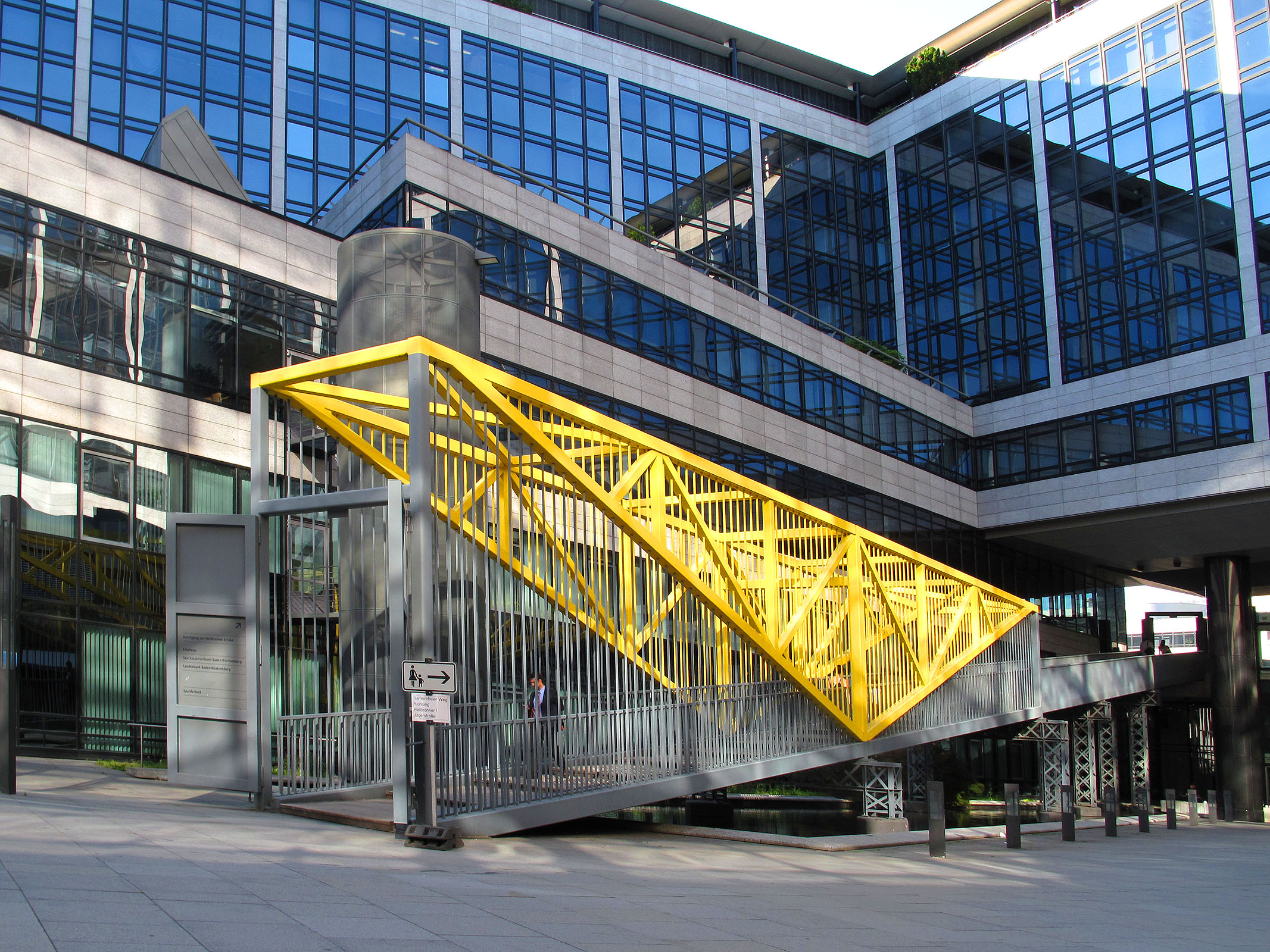 Siah Armajani, Bridge/Ramp, 1994, Stuttgart-Mitte, Innenhof der LBBW, beim Hauptbahnhof